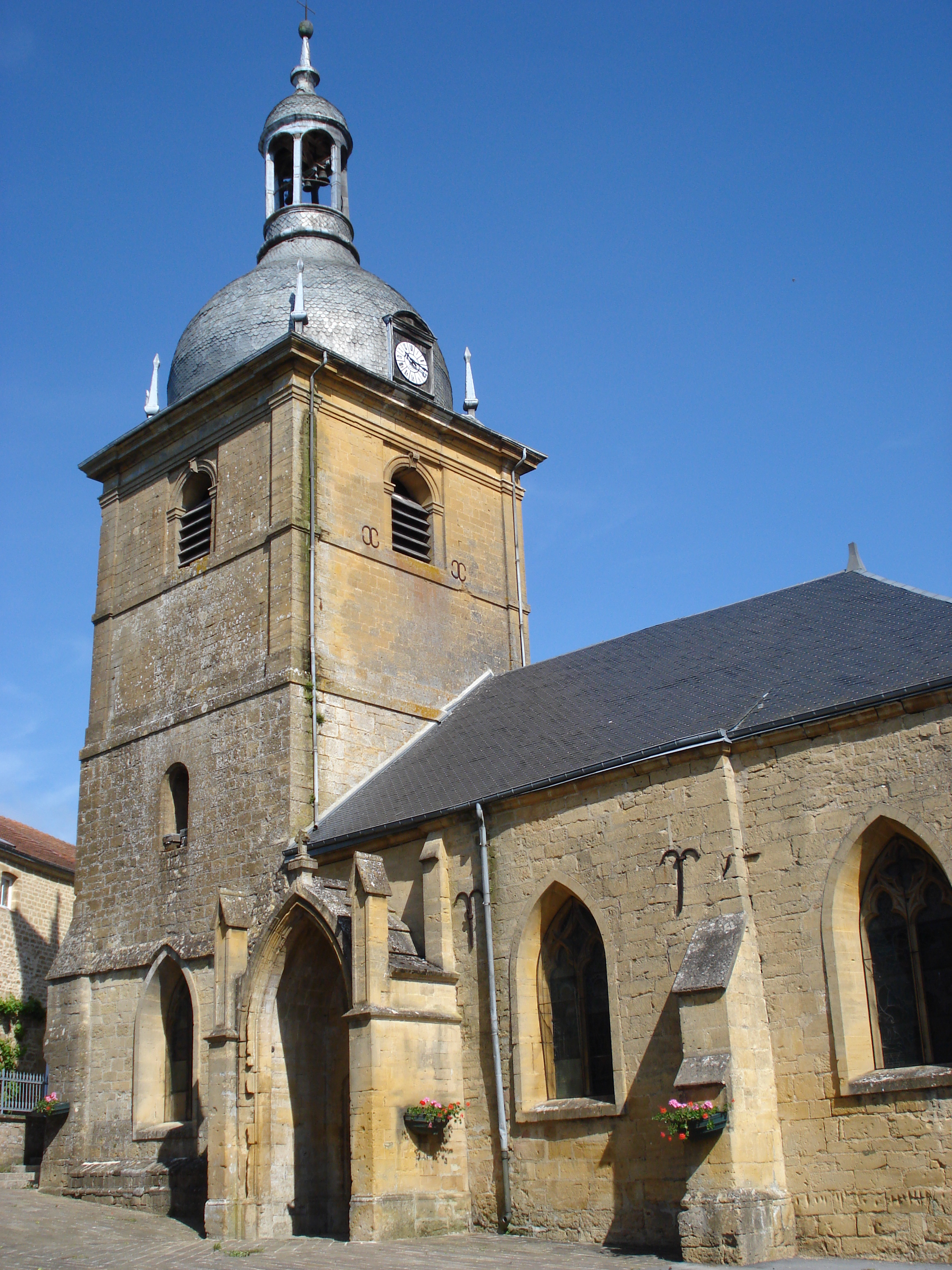 Hannogne-St.Martin (Ardennes, Fr) l'église.